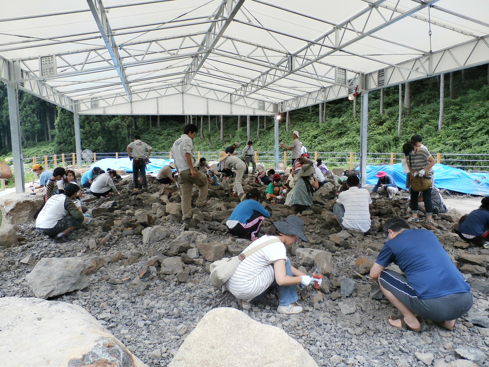 野外恐竜博物館での化石発掘体験